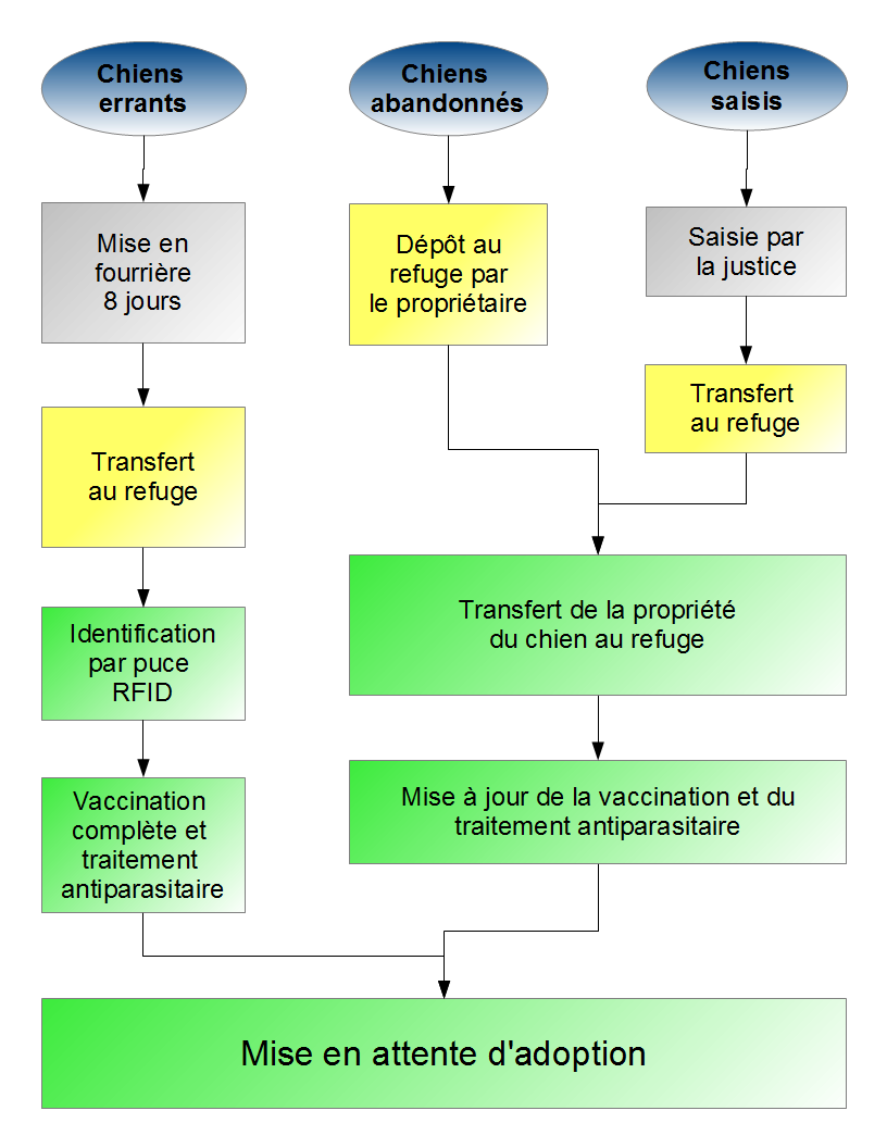 Processus de gestion des chiens des refuges en France